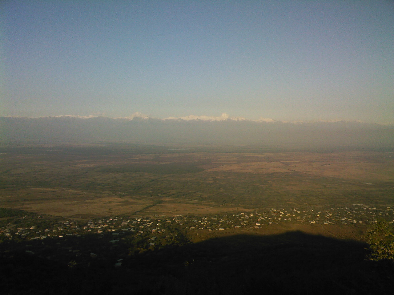 Alazani valley in Kakheti, Georgia